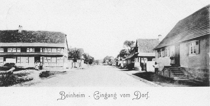 Beinheim (Bas-Rhin - France)